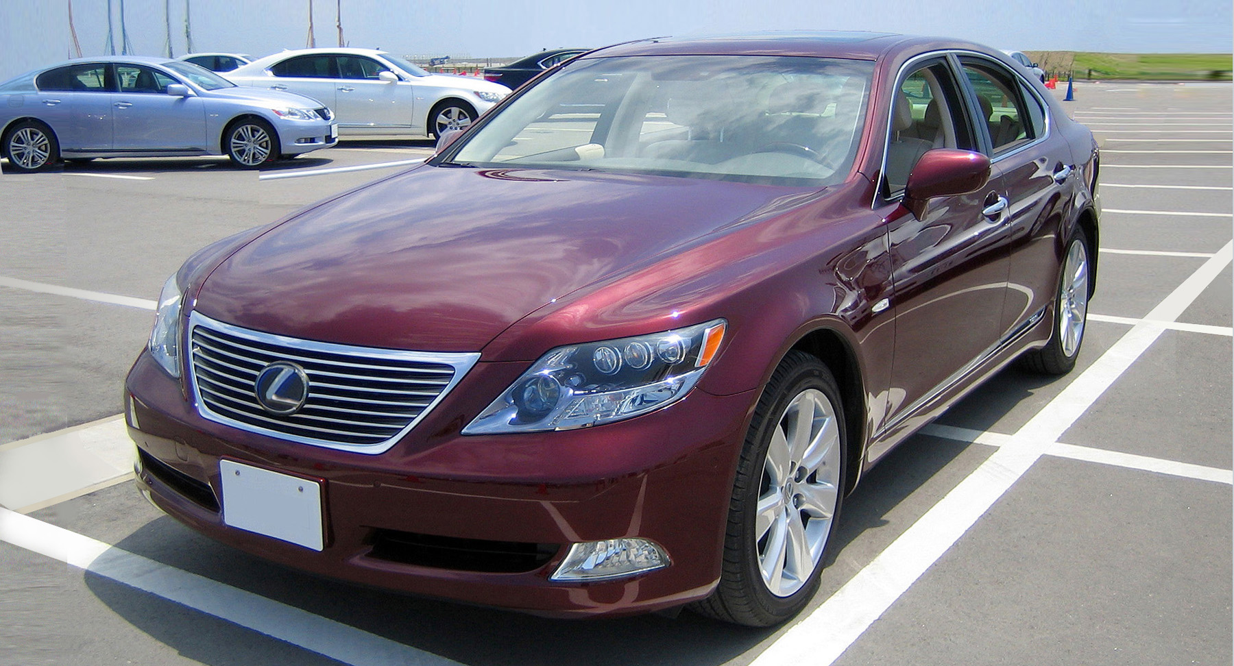 LEXUS LS600h 撮影者：H-Onda-Type-R